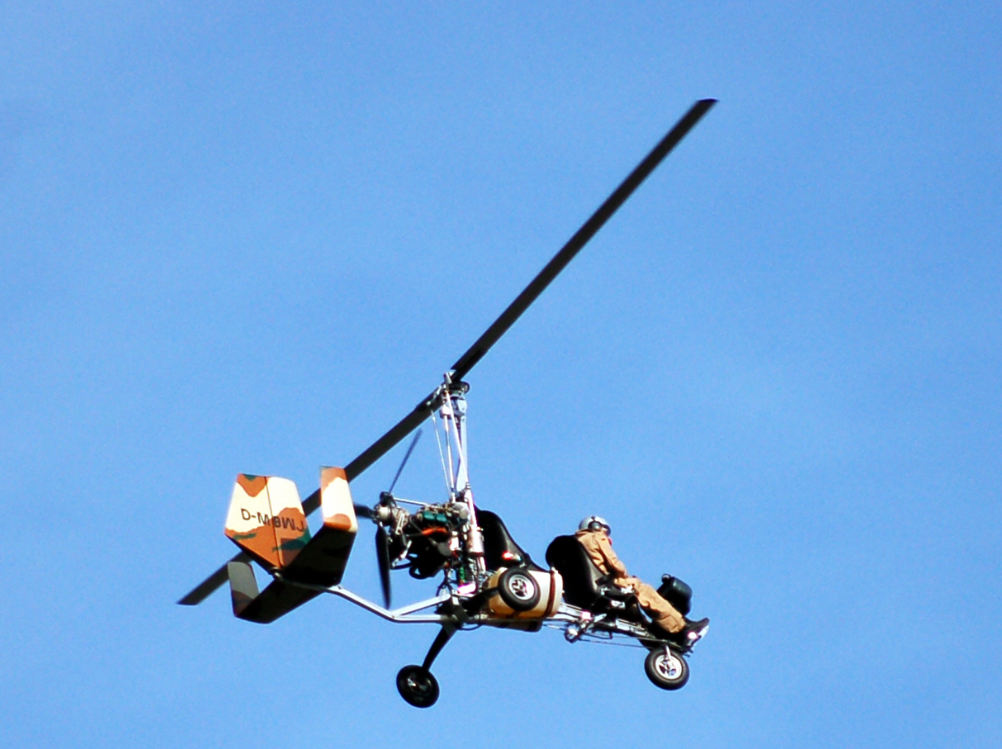 Autogyro MT-03 (D-MTBI) über dem Flugplatz Uetersen